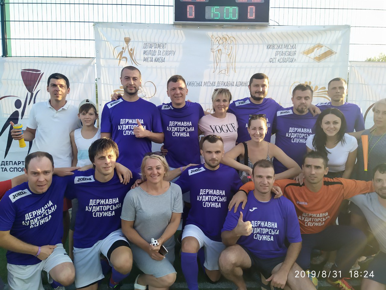 Футбол Коблево 2019